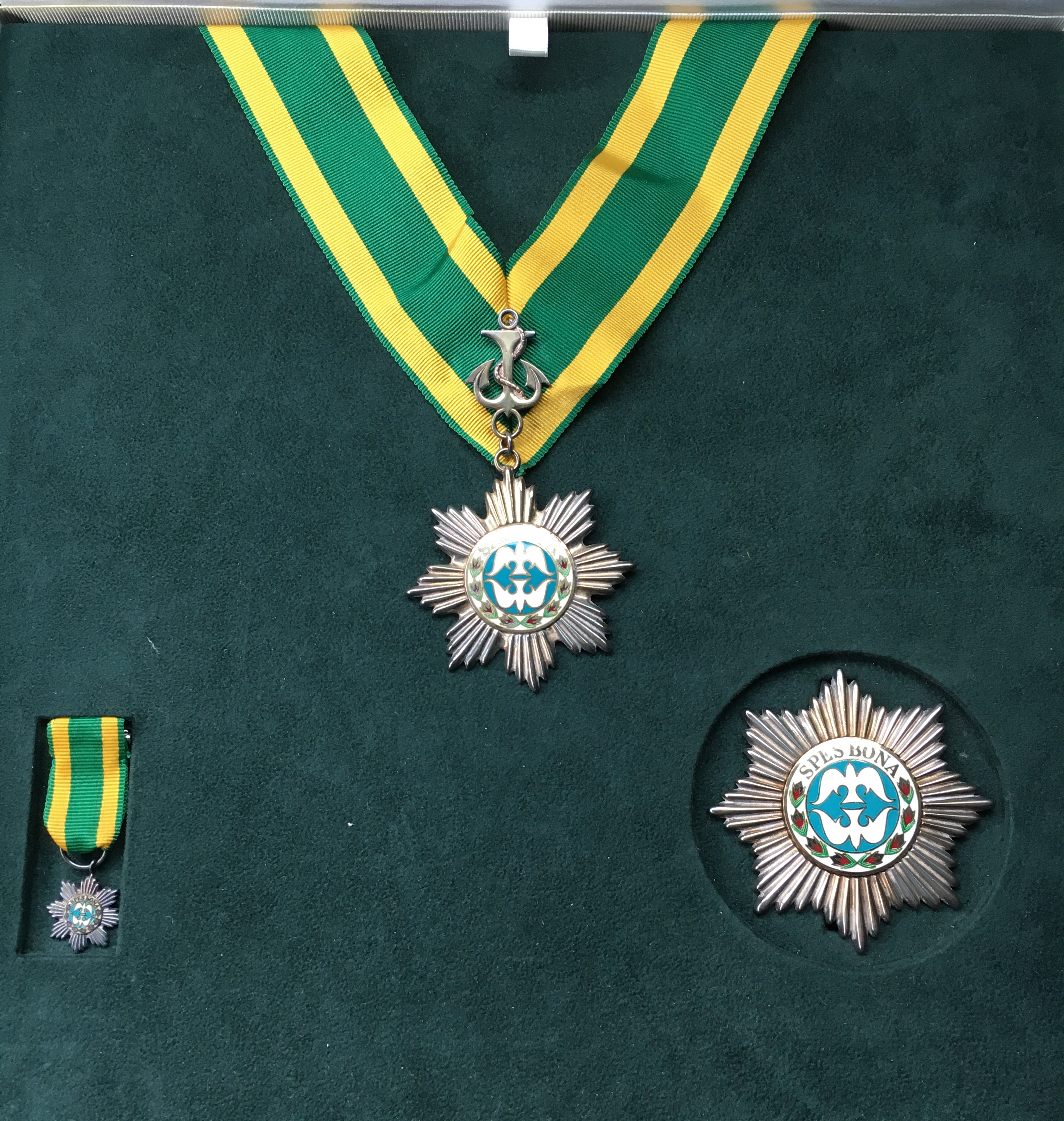 Conjunto de Gran Oficial de la Orden de la Buena Esperanza, República de Sudáfrica. AEA Collections